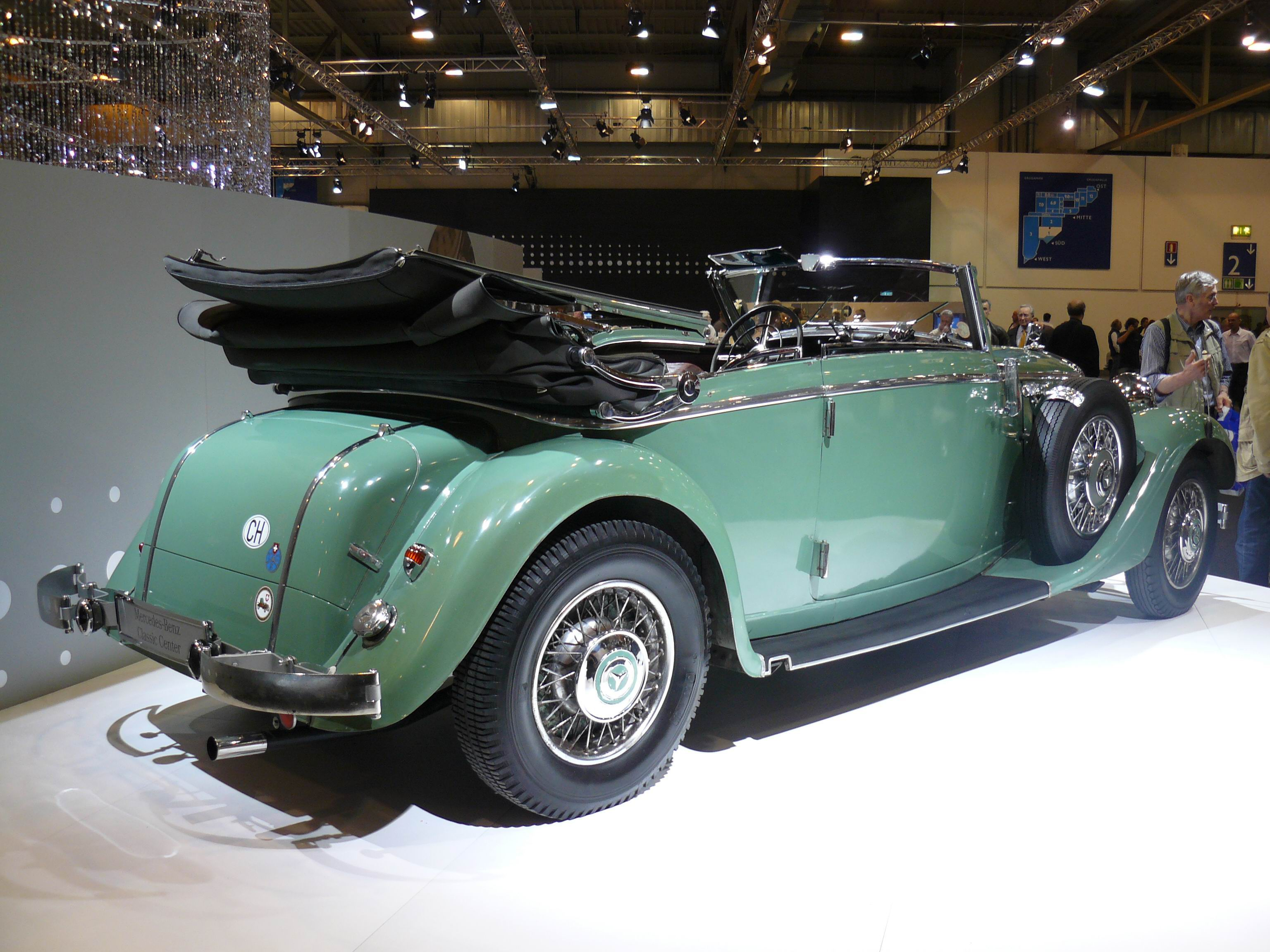 Essen 2011